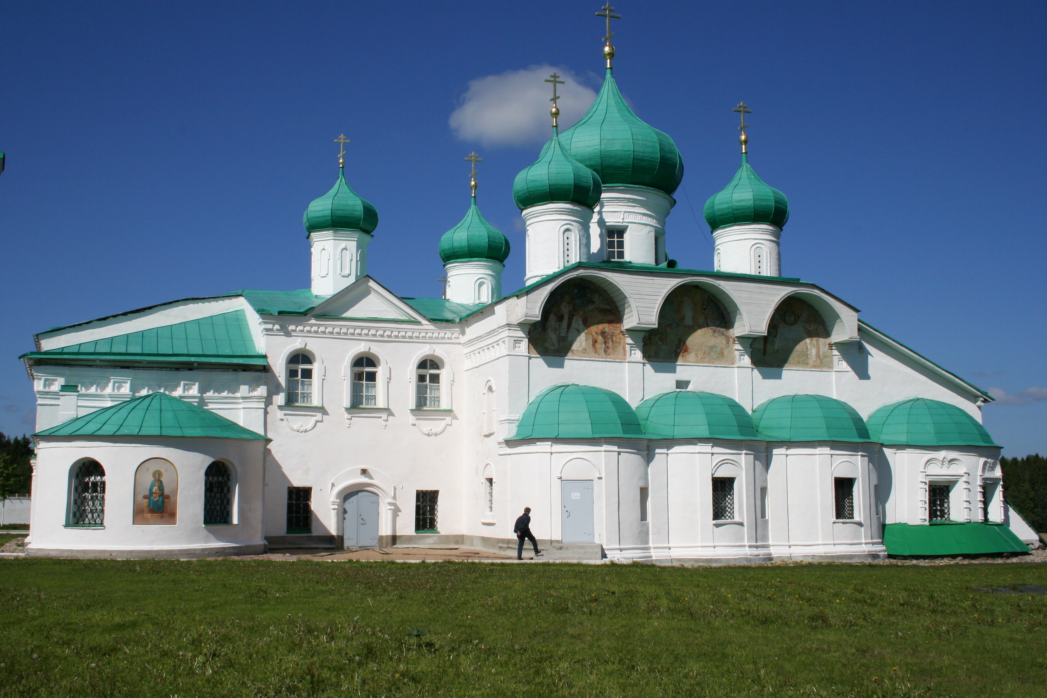 Pyhän kolminaisuuden luostari in Lotinapelto